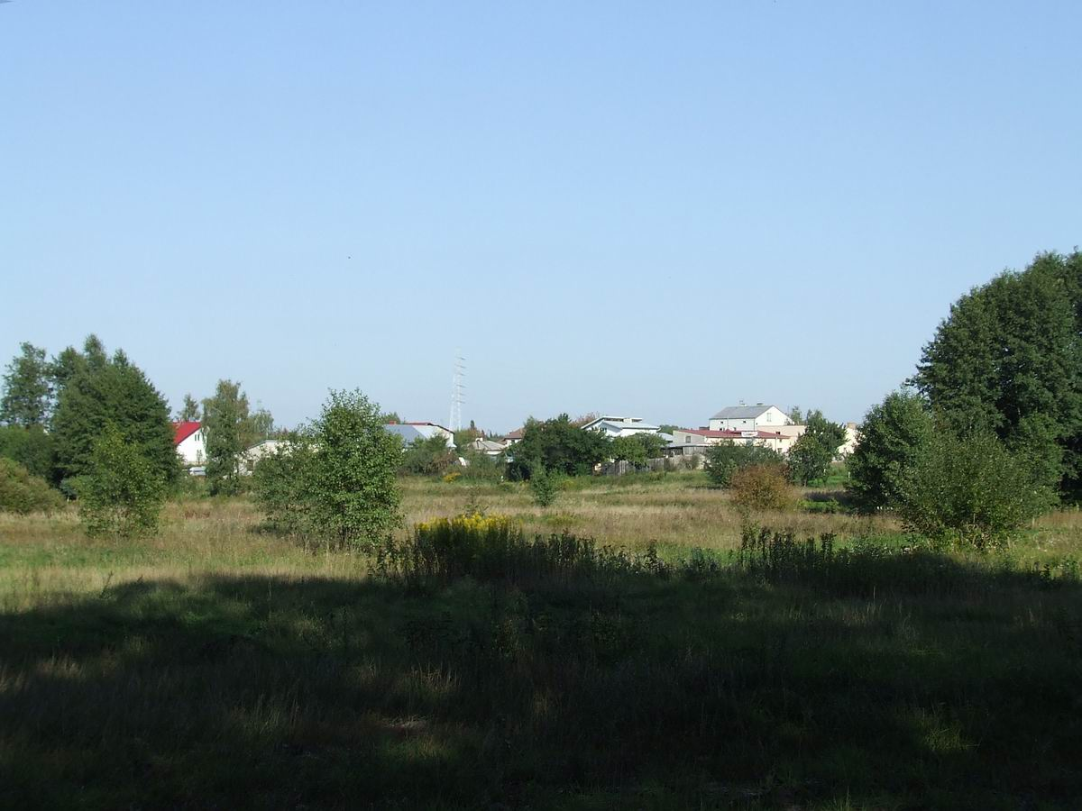 Wólka Węglowa, osiedle w gminie Bielany w Warszawie